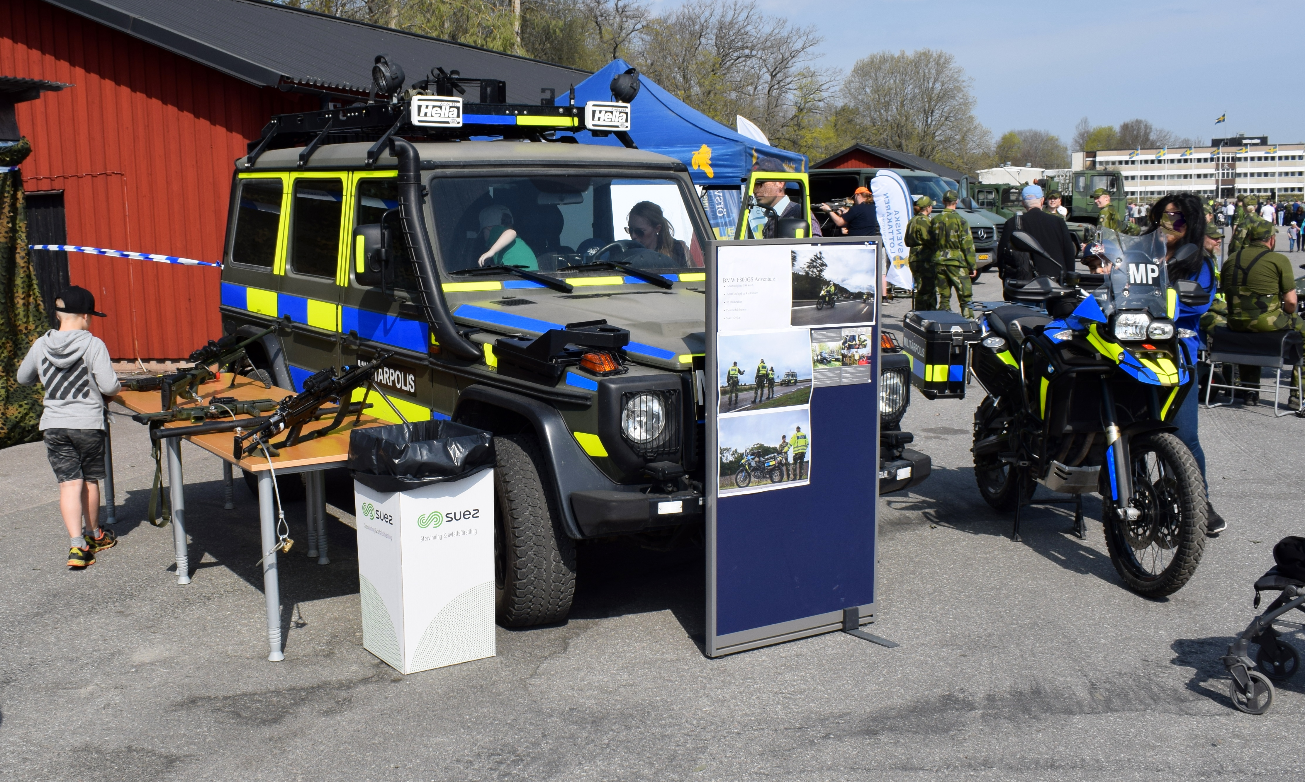 Terrängbil 14 finns både i pansrat och opansrat utförande, har en sexcylindrig motor på 184 hästkrafter, och driver på alla fyra hjul. Den drivs på diesel och kan köra i cirka 80 mil på en full tank. Den klarar att köra i cirka 60 centimeter djupt vatten och väger cirka 2,1 ton opansrat utan extra utrustning. Den skalskyddade versionen väger cirka 1,5 ton extra.